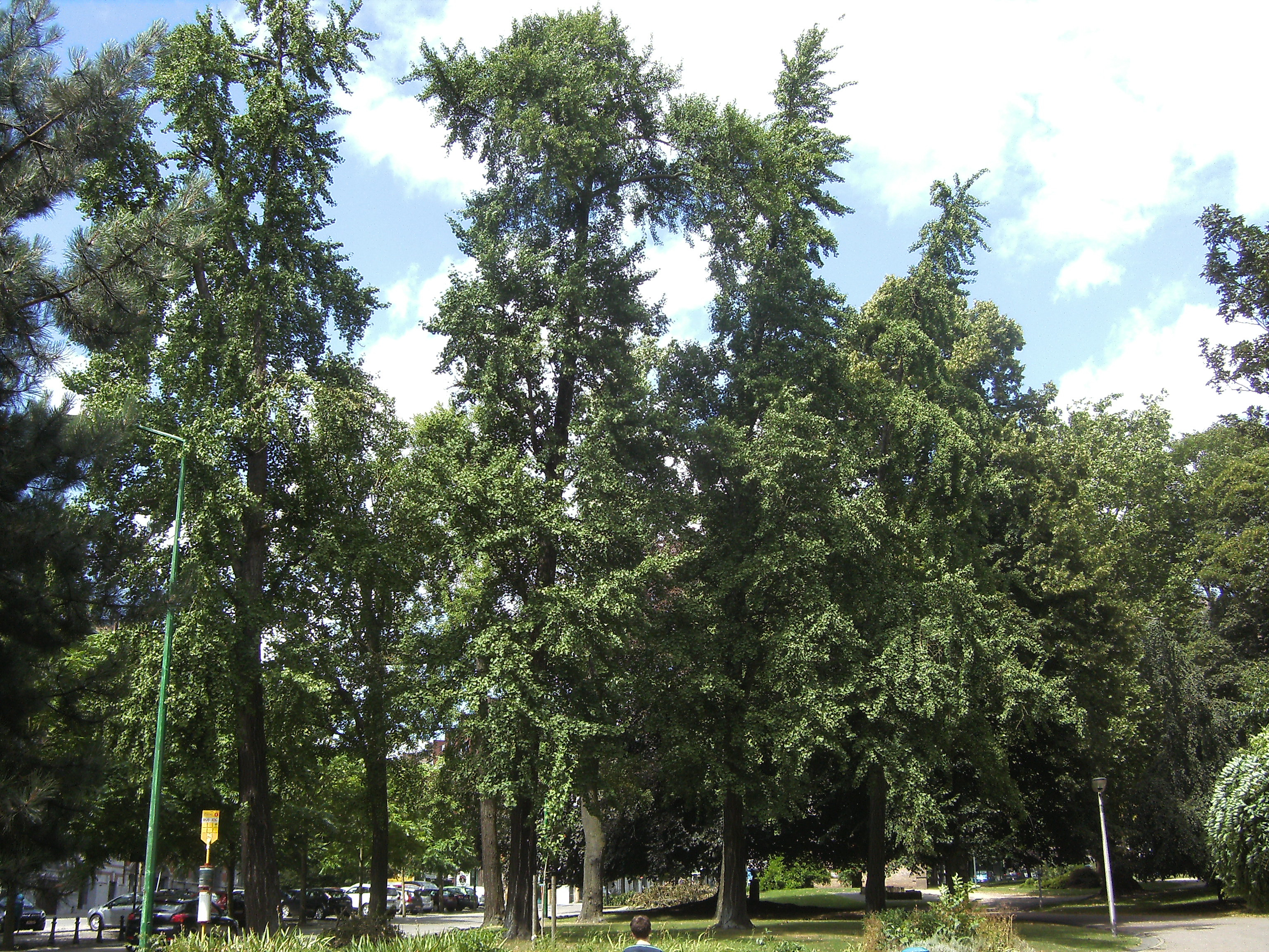 Charleroi (Belgique) - Parc Astrid : bosquet de dix Ginkgo biloba